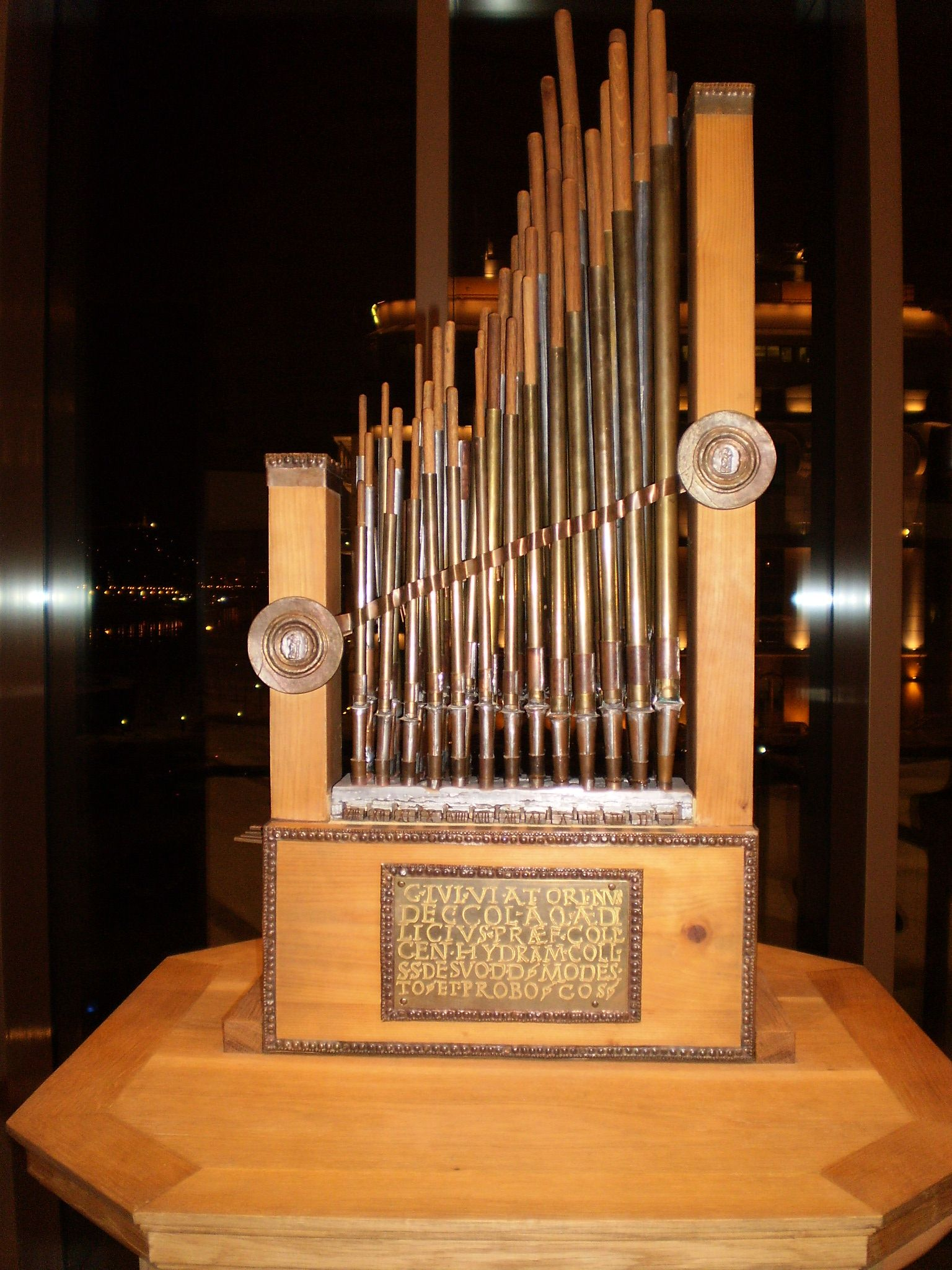 Reconstruction of a hidraulis (water organ) found in Aquincum (Hungary) Az aquincumi víziorgona rekonstrukciója a MÜPÁ-ban